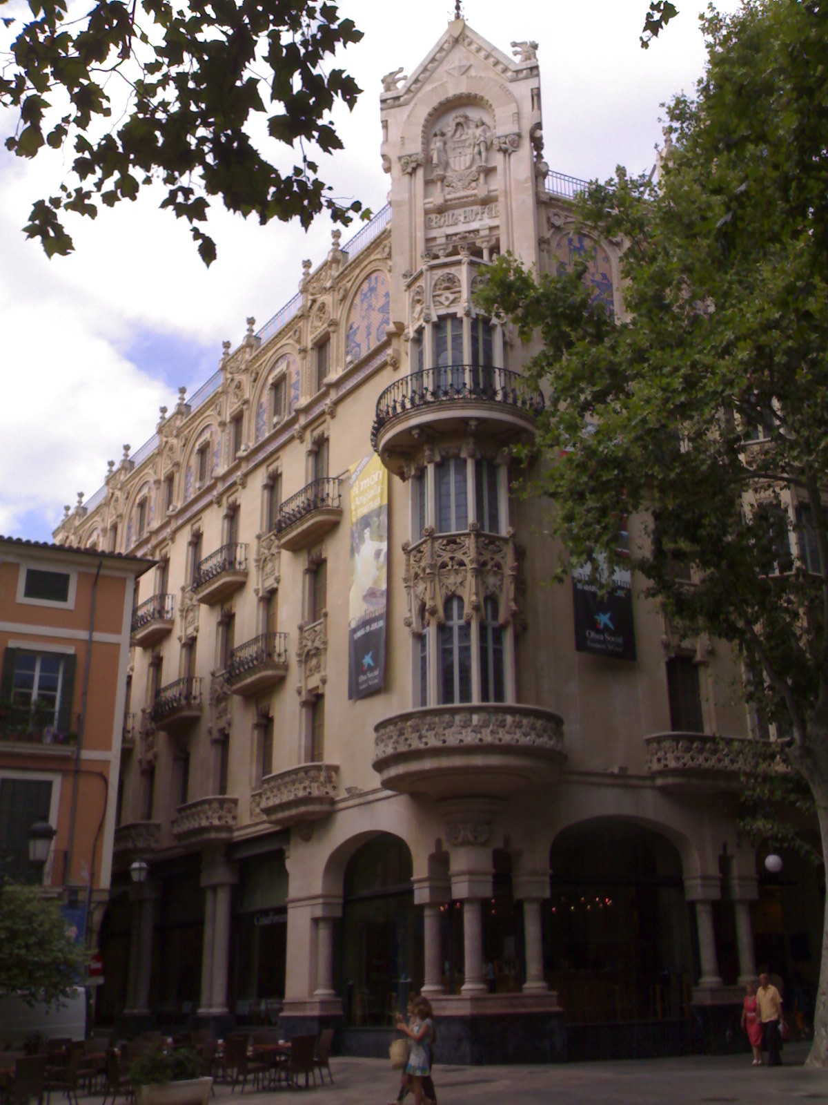 Gran Hotel de Palma, a la plaça Weyler